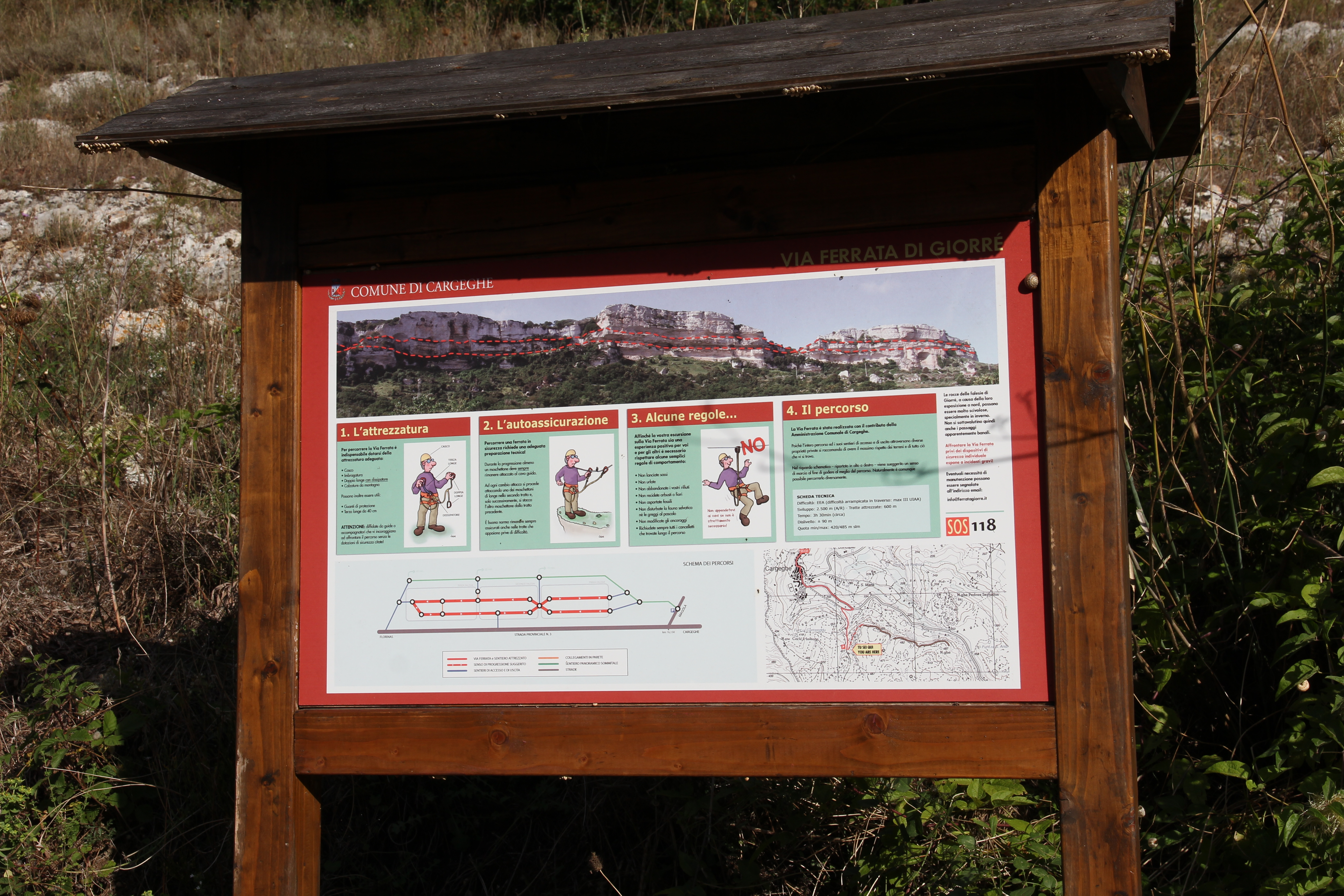 Cargeghe - Inizio via ferrata di Giorrè